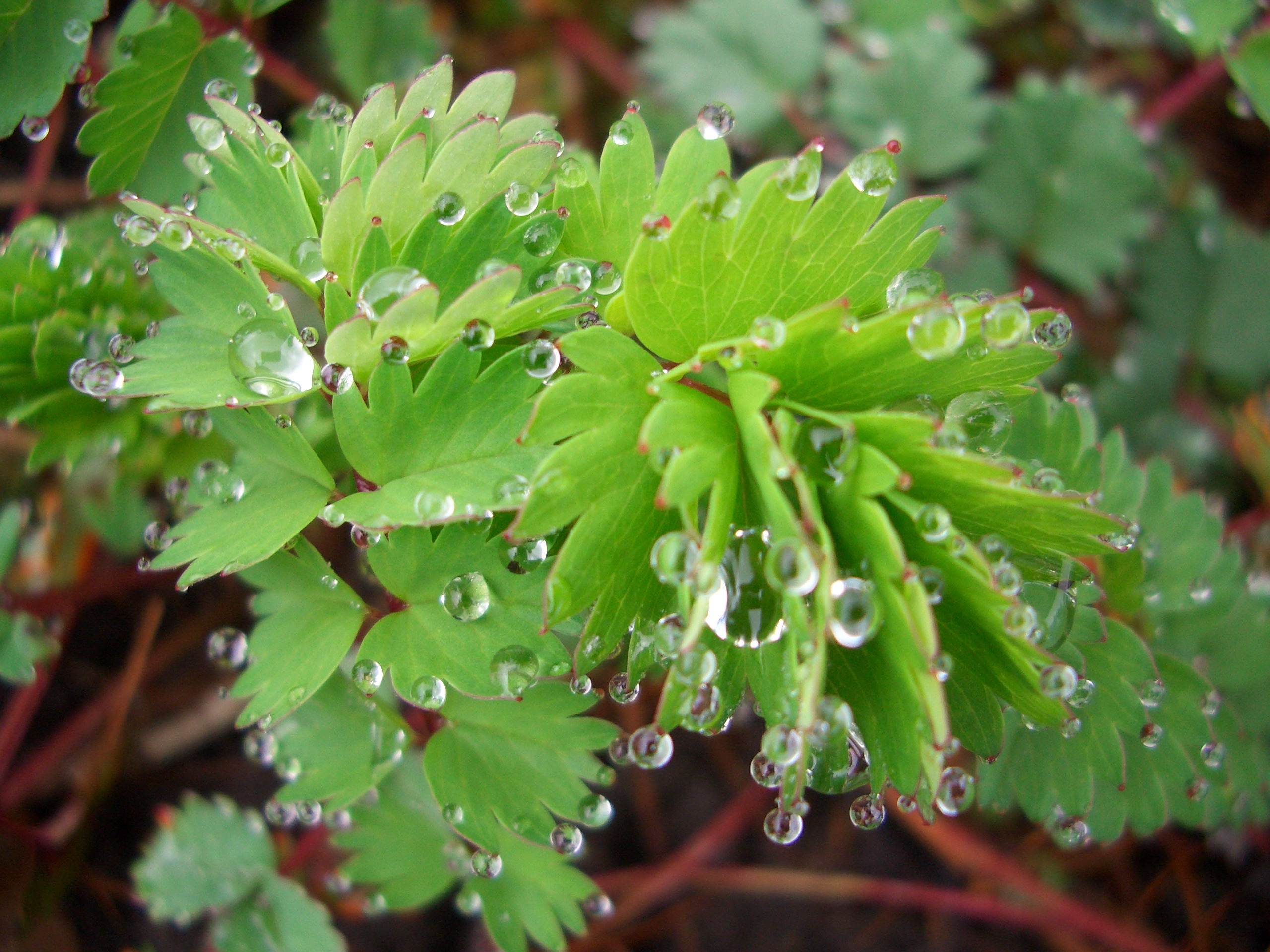 Kleiner Wiesenknopf (Sanguisorba minor) mit Guttationstropfen im Botanischen Garten zu Berlin